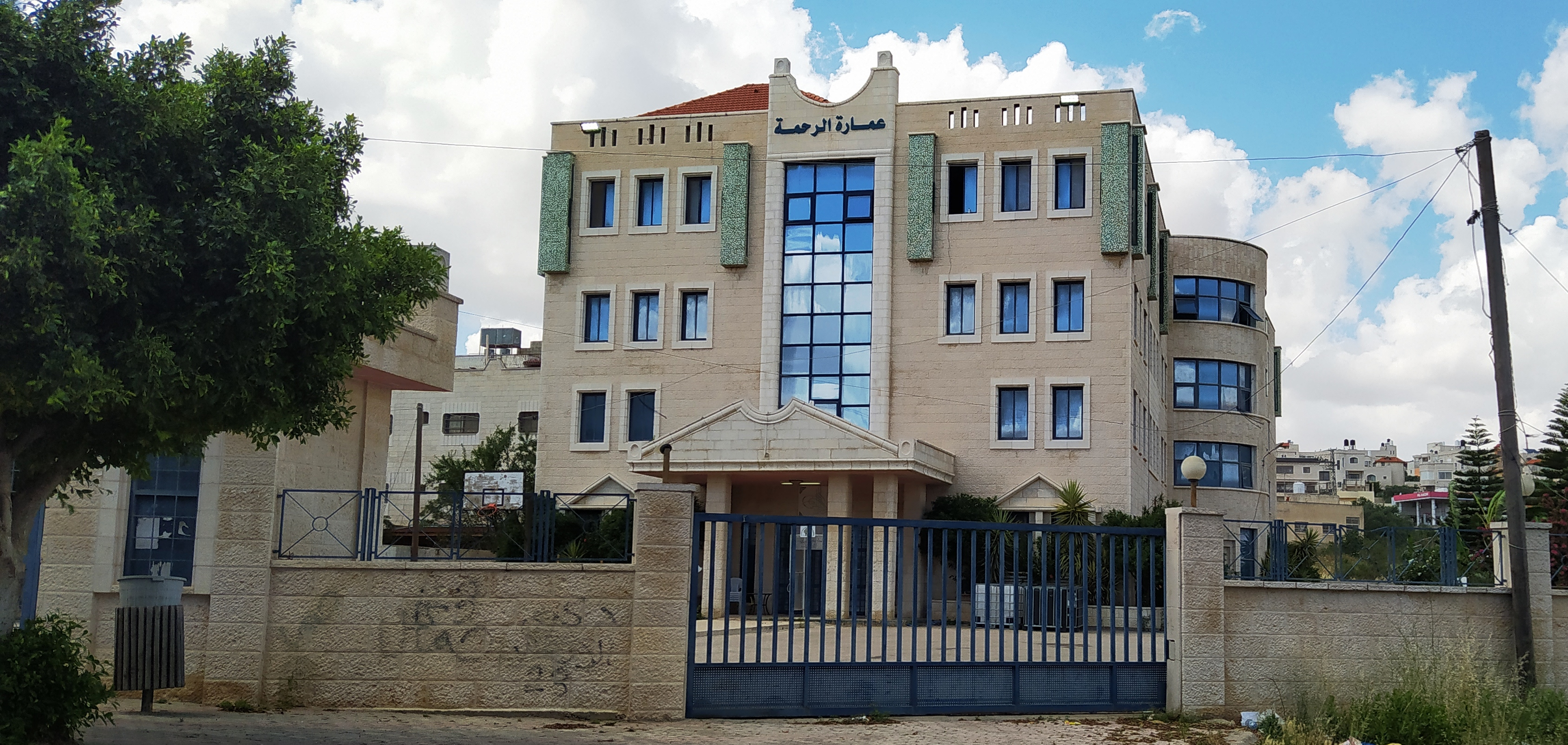 مبنى جهزته السلطات المحلية في محافظة سلفيت ليكون مقرًا للحجر الصحي لحالات مرض فيروس كورونا 2019-20